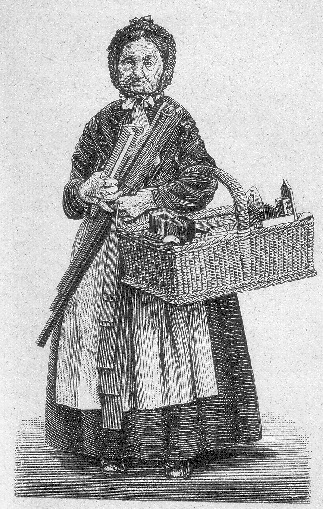 Das Ellen-Malchen (Amalie Renner), ein Breslauer Original